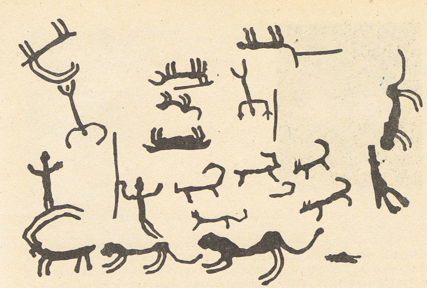 Скан наскального изображения марза Сюник, Армения